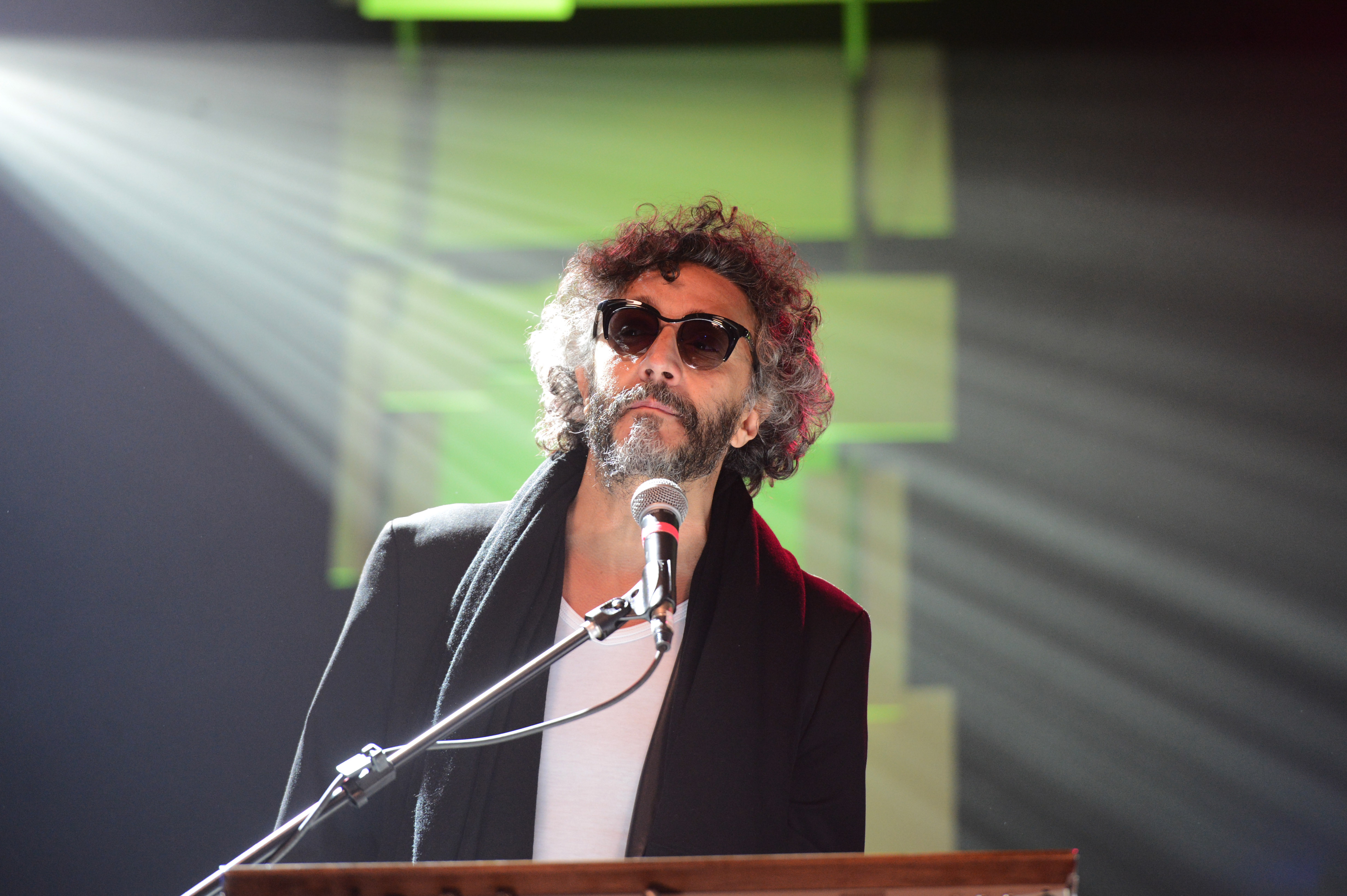 Fito Páez. Homenaje Gustavo Cerati. 04.11.2014. Foto TVP 2014